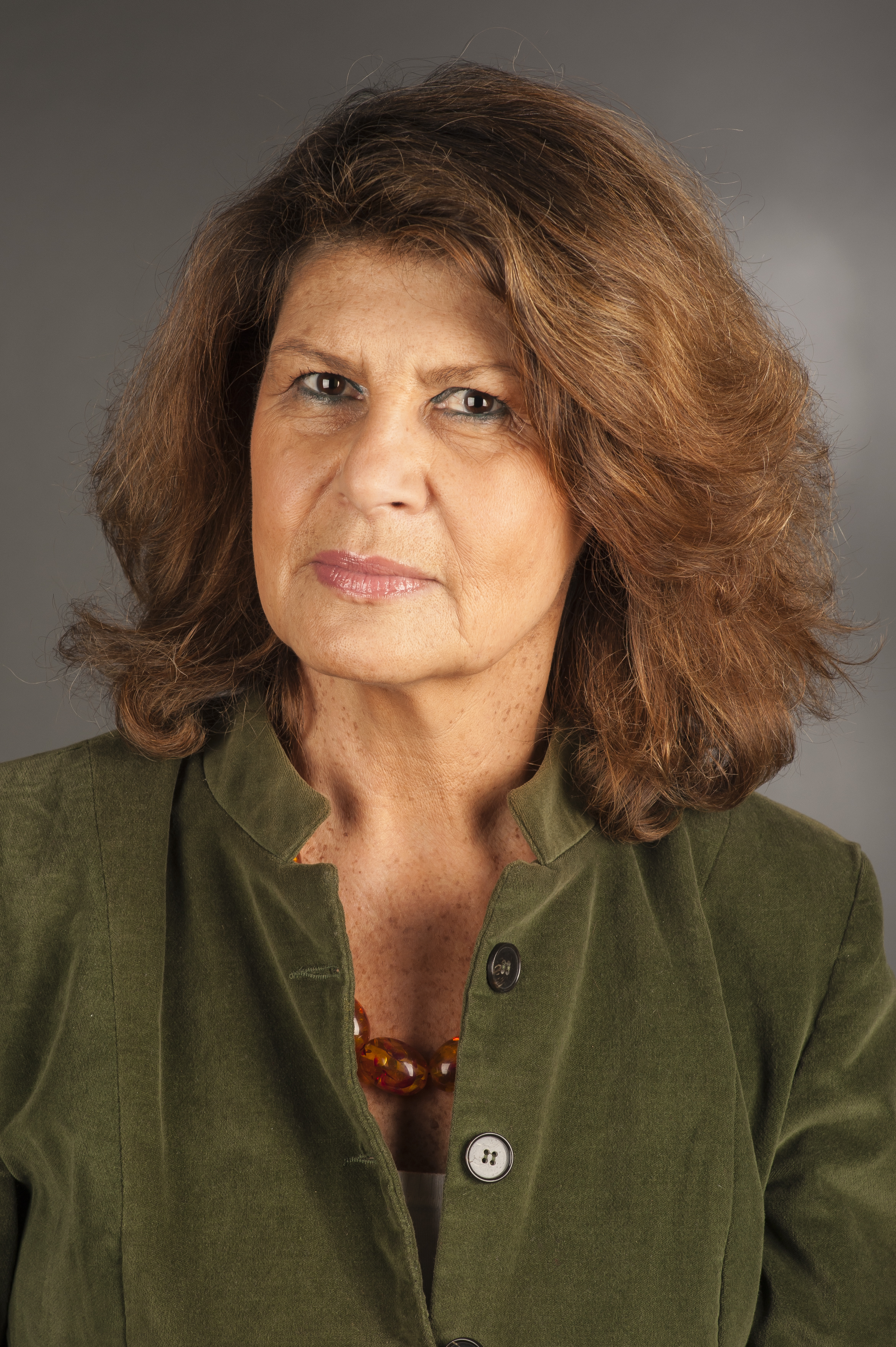 Silvia Costa